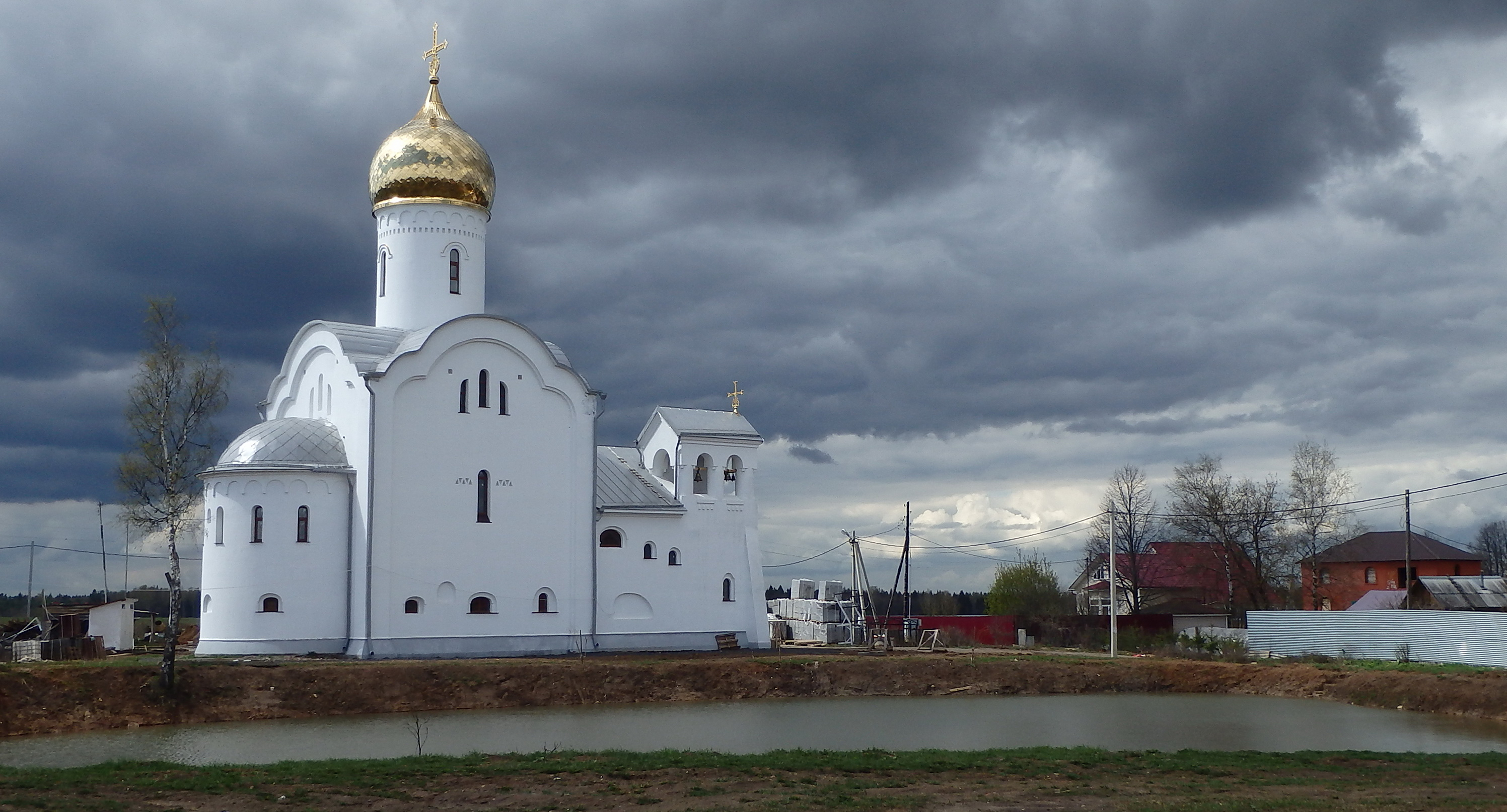 Богородицерождественский храм (Поварово)